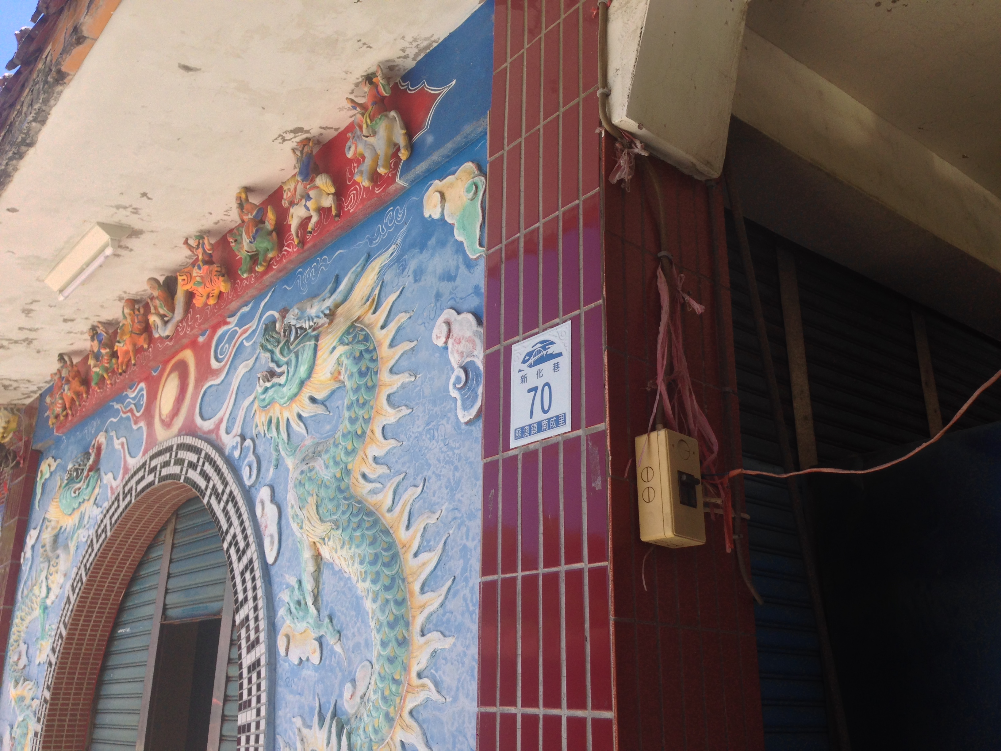 中文（台灣）: 南方澳南仙宮門牌